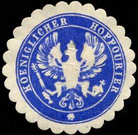 Sealing stamp Title: Koeniglicher Hoffourier Description: blau, weiß, geprägt Place: size: 3 cm